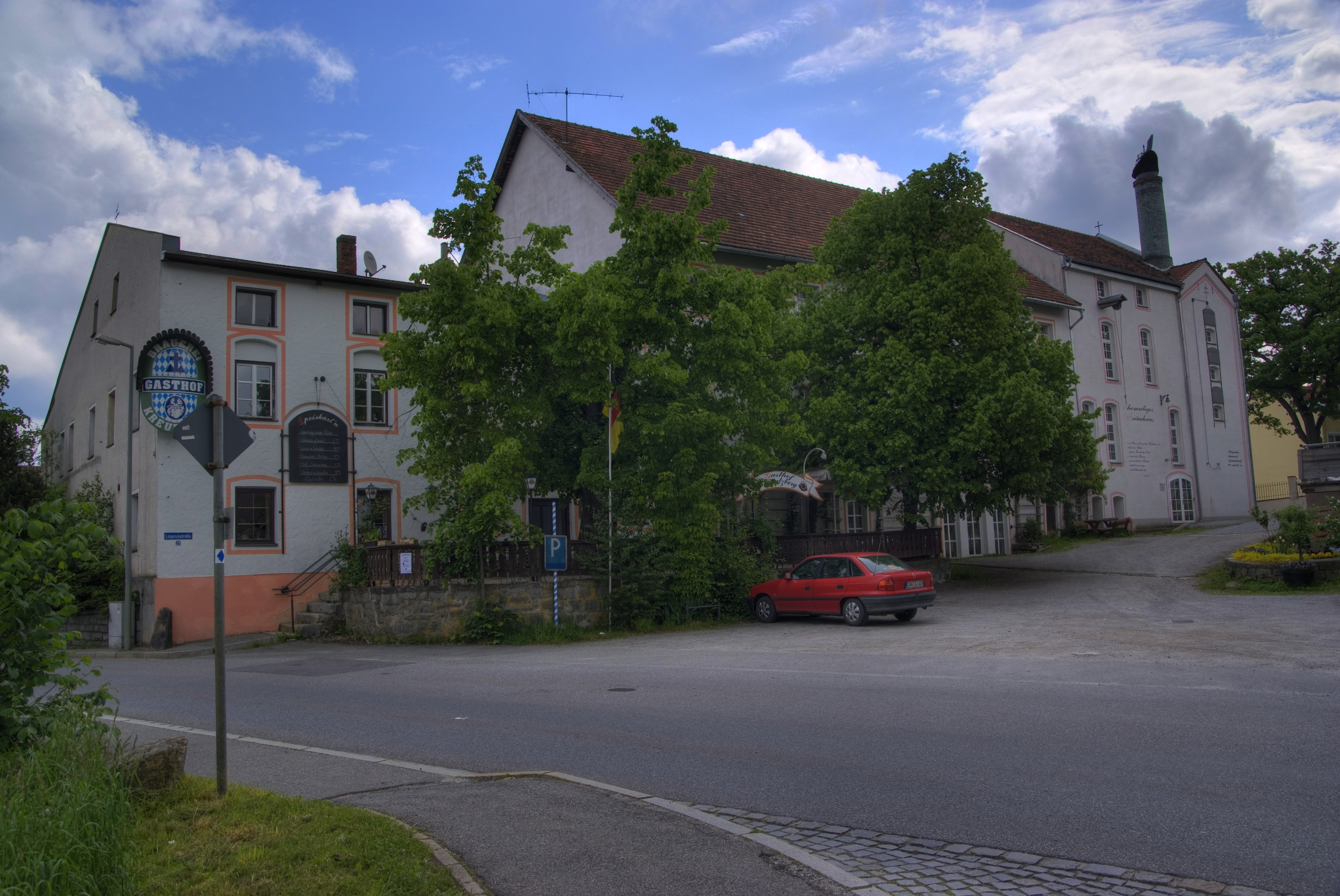 Haus Kreutztberger in Viechtach